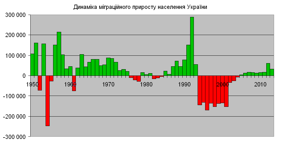 Migration growth in Ukraine, 1950-2013